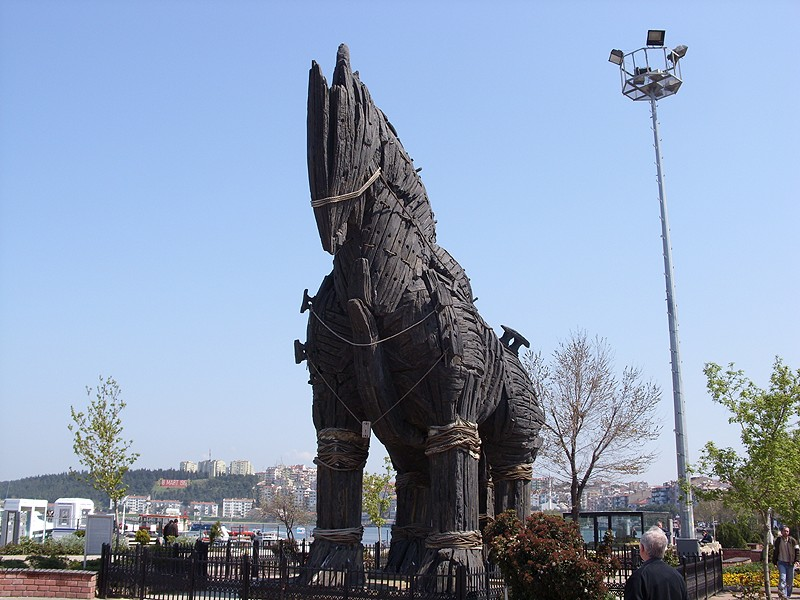 Canakkale - Cavallo di Troia